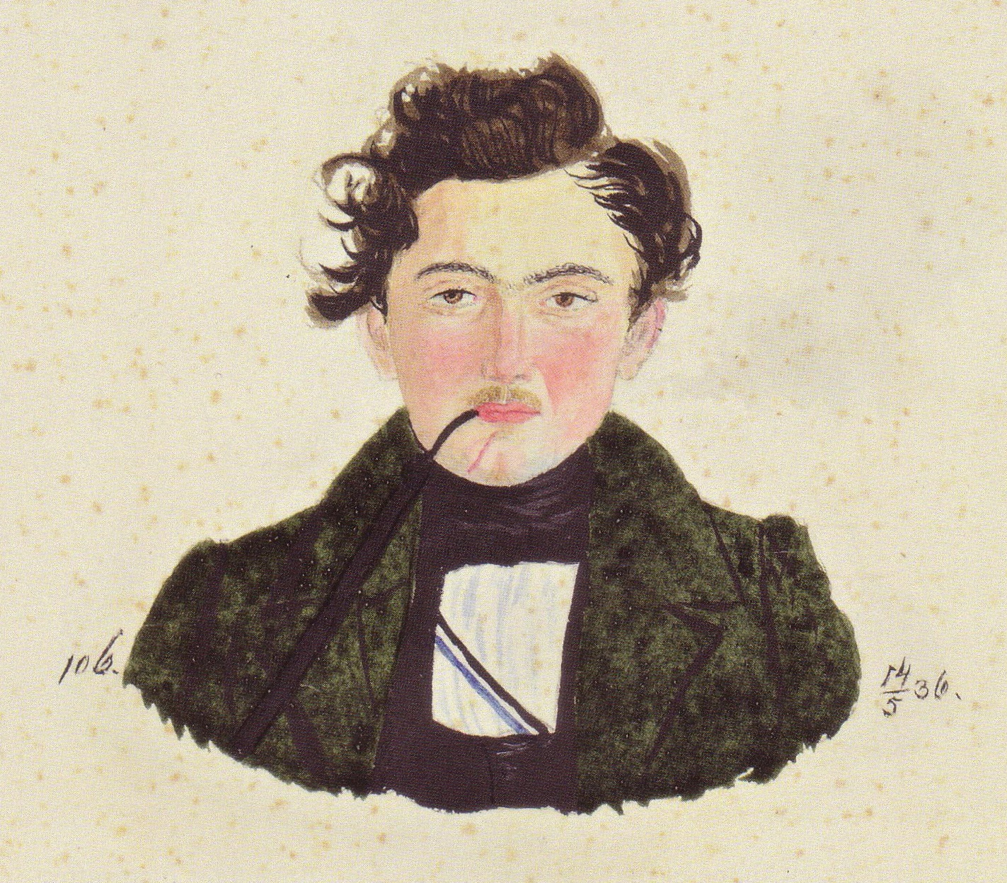 Aquarellporträt von Eduard Caspari (geb. 12. Feb. 1816 in Laptau bei Königsberg) als Student der Rechtswissenschaft an der Albertus-Universität und Angehöriger der Studentenverbindung Pappenhemia